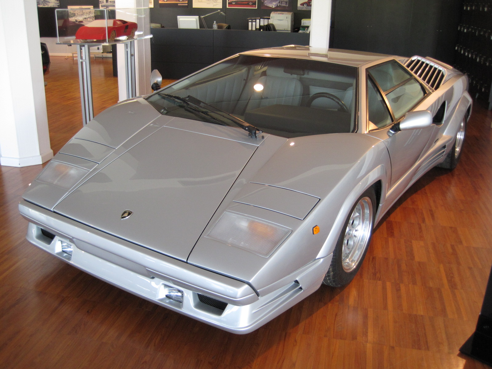 Musée Lamborghini - Countach 25th